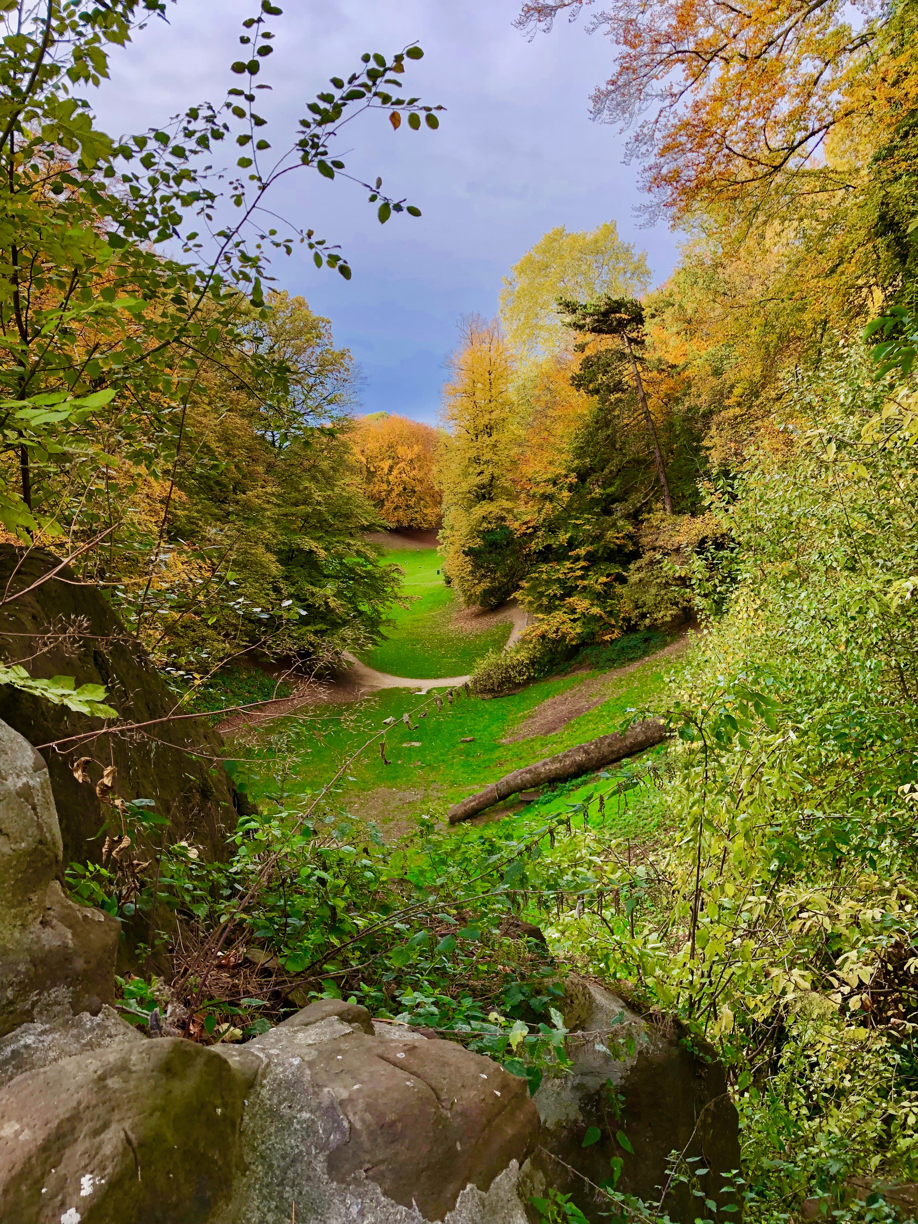 Le ravin du bois de la Cambre